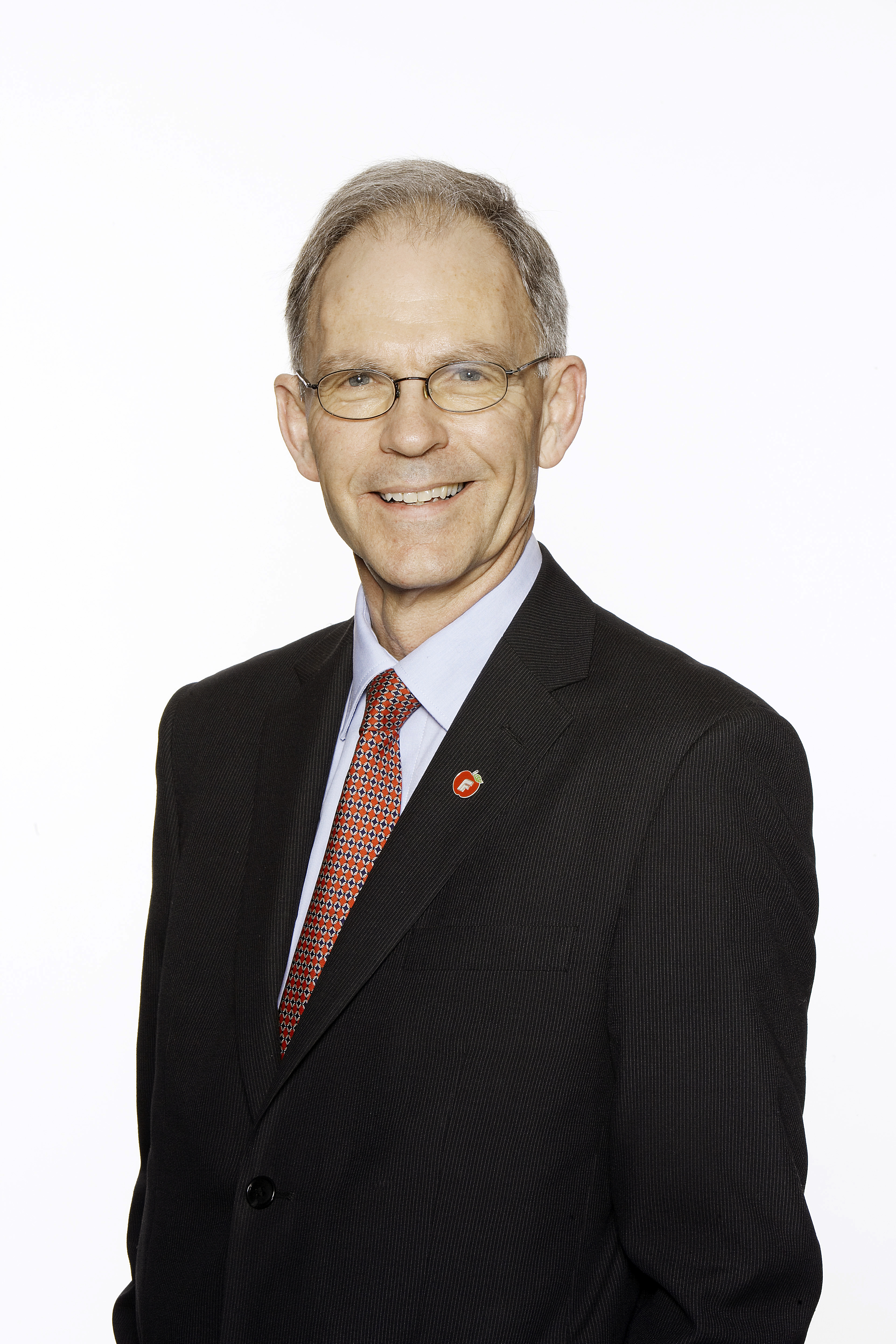 Arne Sortevik, FrP-politiker